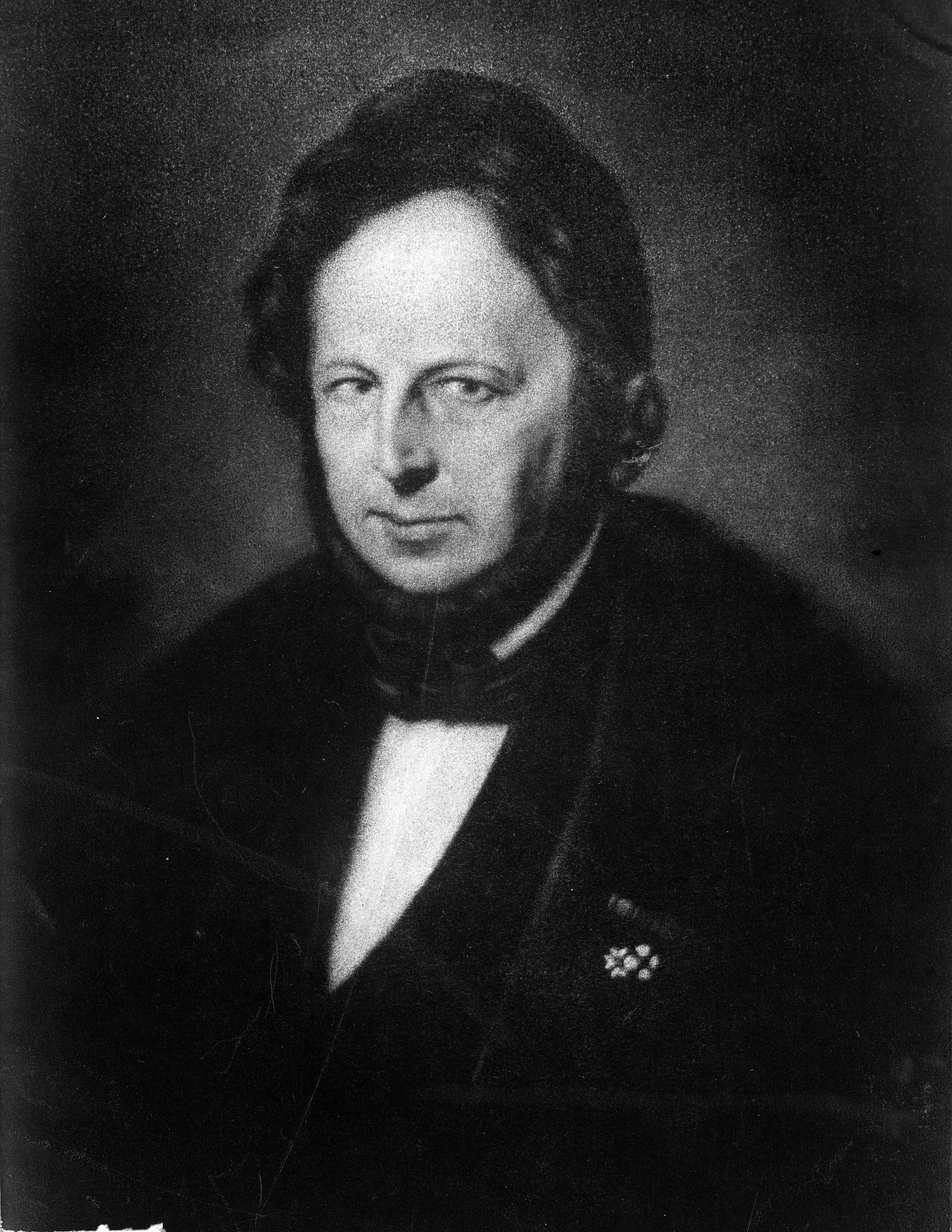 Mr. A.O.E., graaf van Limburg Stirum (2-12-1803 - 12-9-1858). Burgemeester van Leiden v.a. 7-10-1851. Curator van de Leidse Universiteit. Rentmeester van Rijnland, etc.